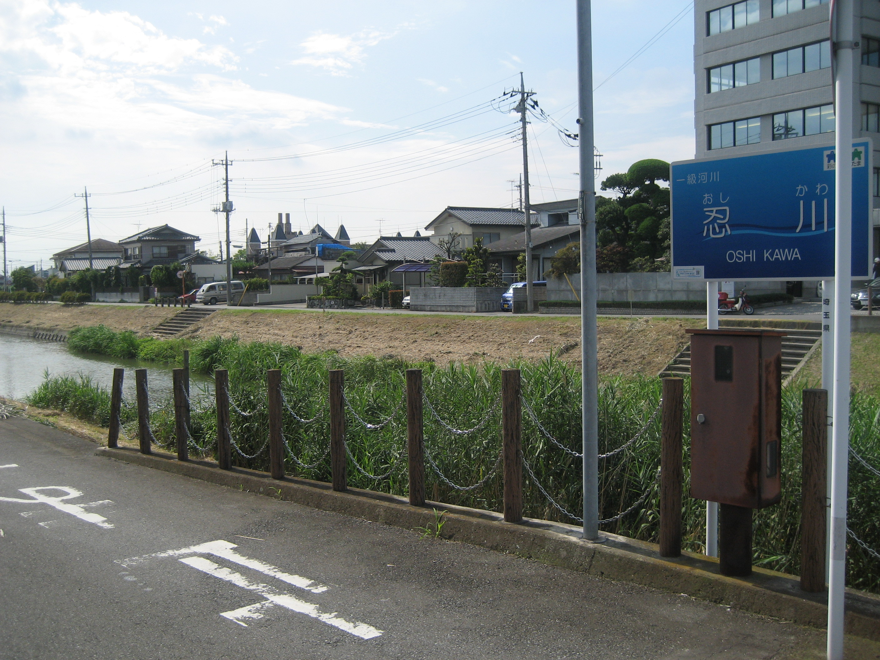 忍川行田市内（行田市駅付近）